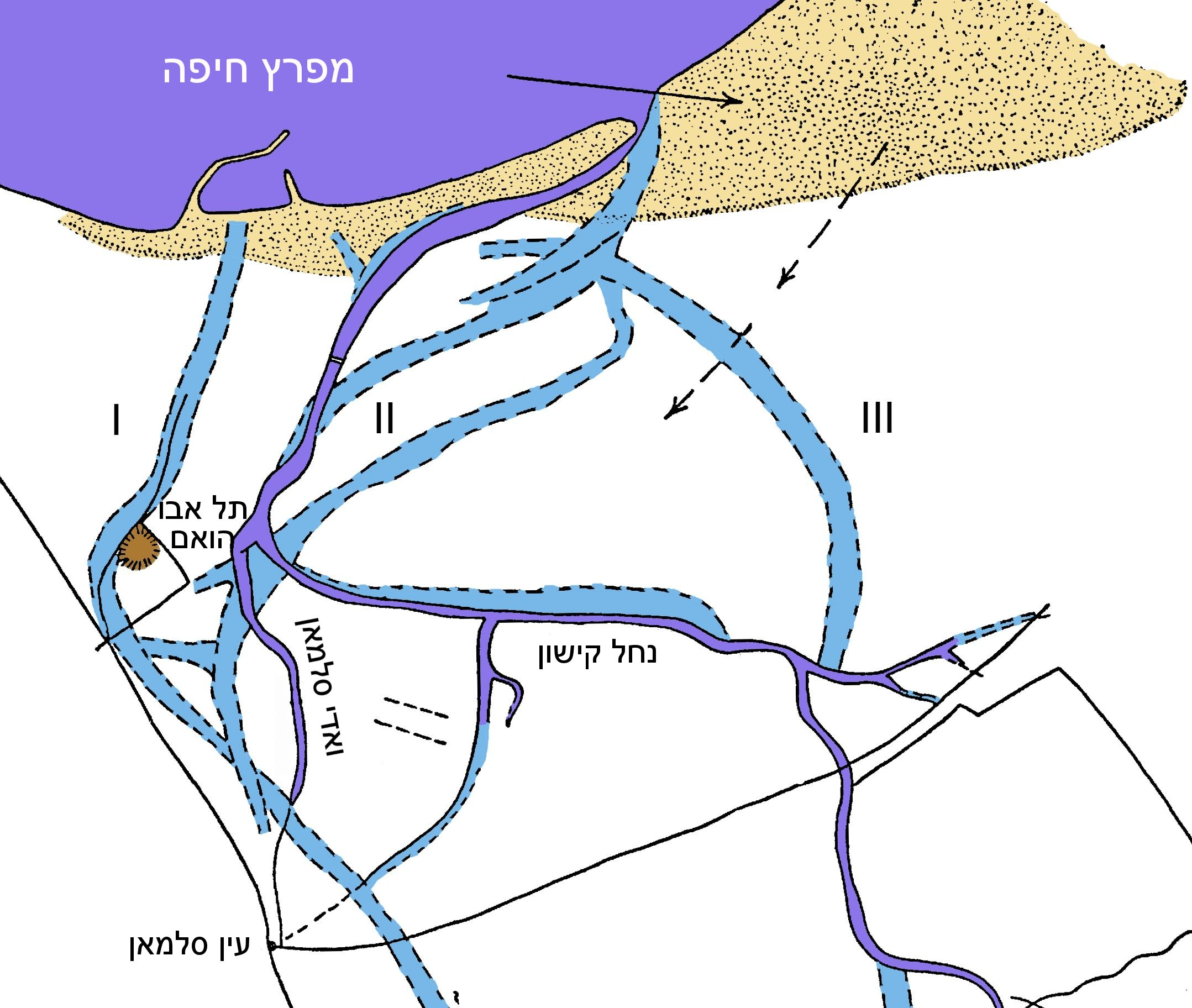 תל אבו הואם - מפת מיקום